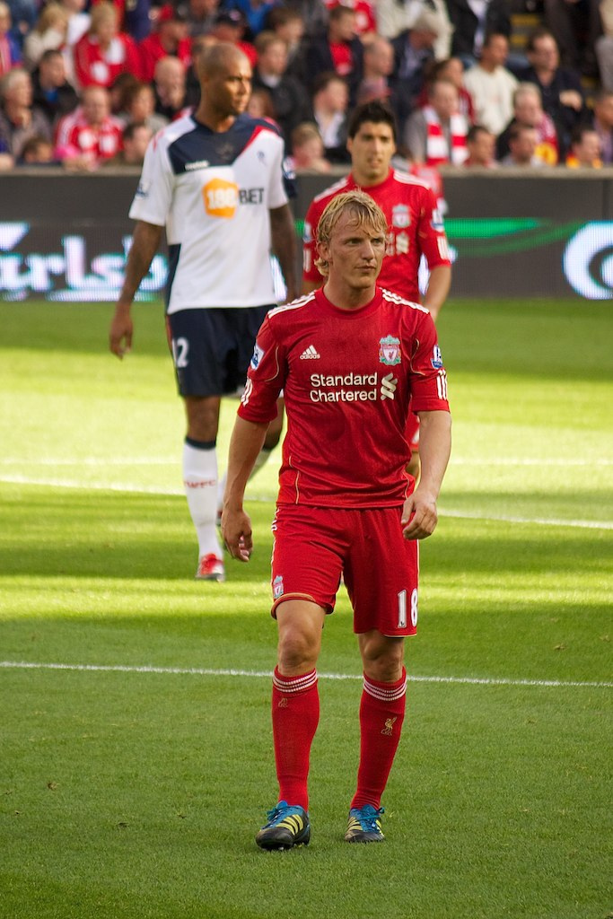 Liverpool vs Bolton 27/08/2011